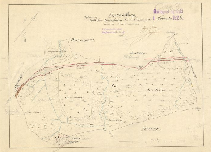 Egebæksvang matrikelkort 1928